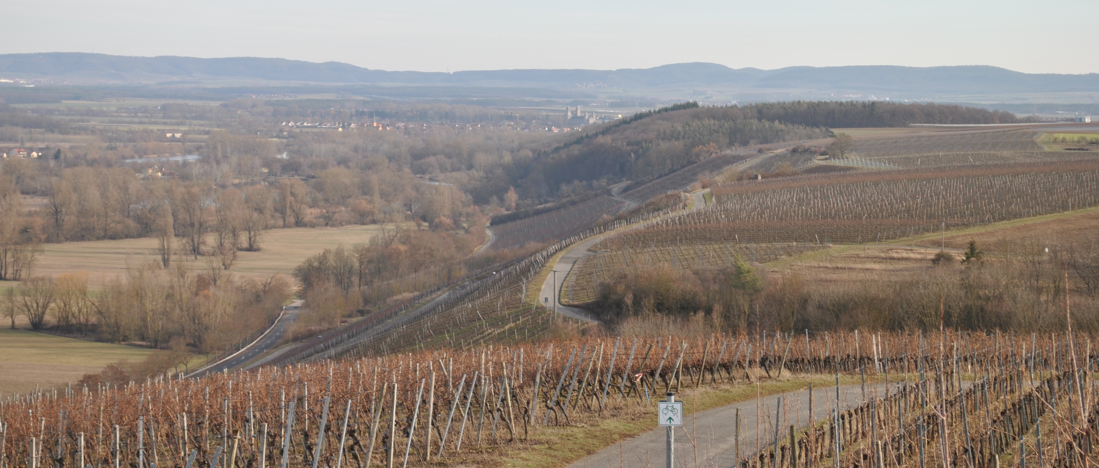 Weinlage Neuseser Glatzen vor Münsterschwarzach